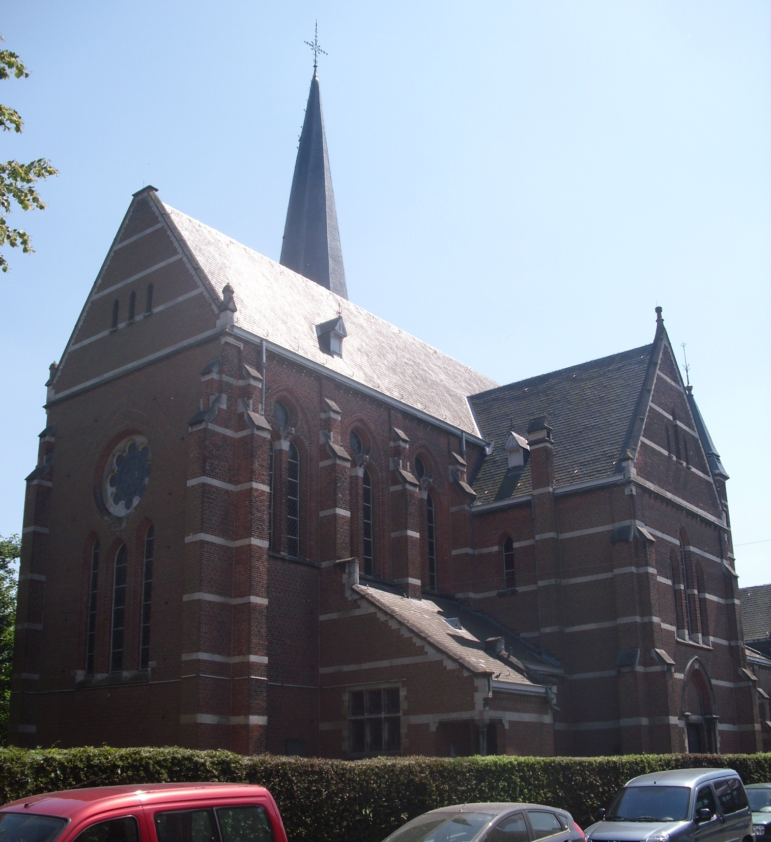 Sint-Stephanuskerk - Wolfgang d'Urselstraat - Hingene - Bornem - Provincie Antwerpen - Vlaams Gewest - België